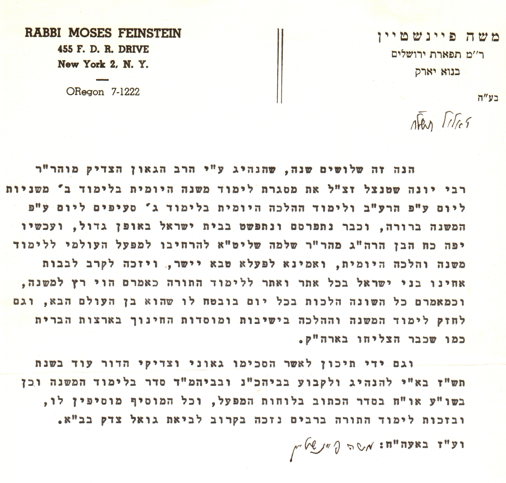 קריאתו החמימה של מנהיגה הרוחני של יהודת ארה"ב הגאון רבי משה פיינשטיין ללמוד הלכה יומית בסדר של 3 הלכות ליום שקבע רבי יונה שטנצל